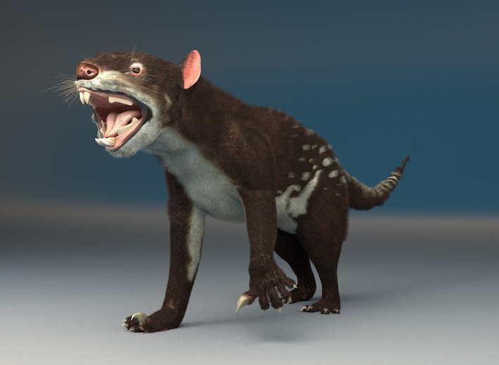 ilustracion en 3d